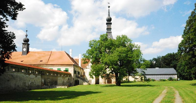 Schloss Uherčice (deutsch Ungarschitz) liegt in der Ortschaft Uherčice u Znojma (Okres Znojmo), Südmähren. Leider verfügt das Schloss über keine repräsentative Front.